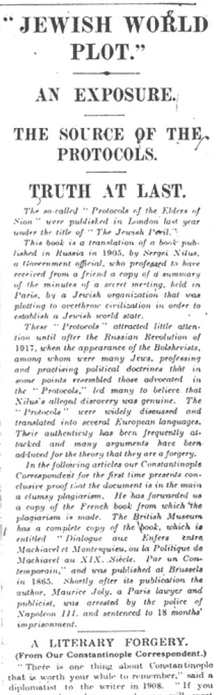 Статья из газеты Таймс (16-18 августа 1921) с сообщением о том, что Протоколы сионских мудрецов - подделка. Полная версия текста.